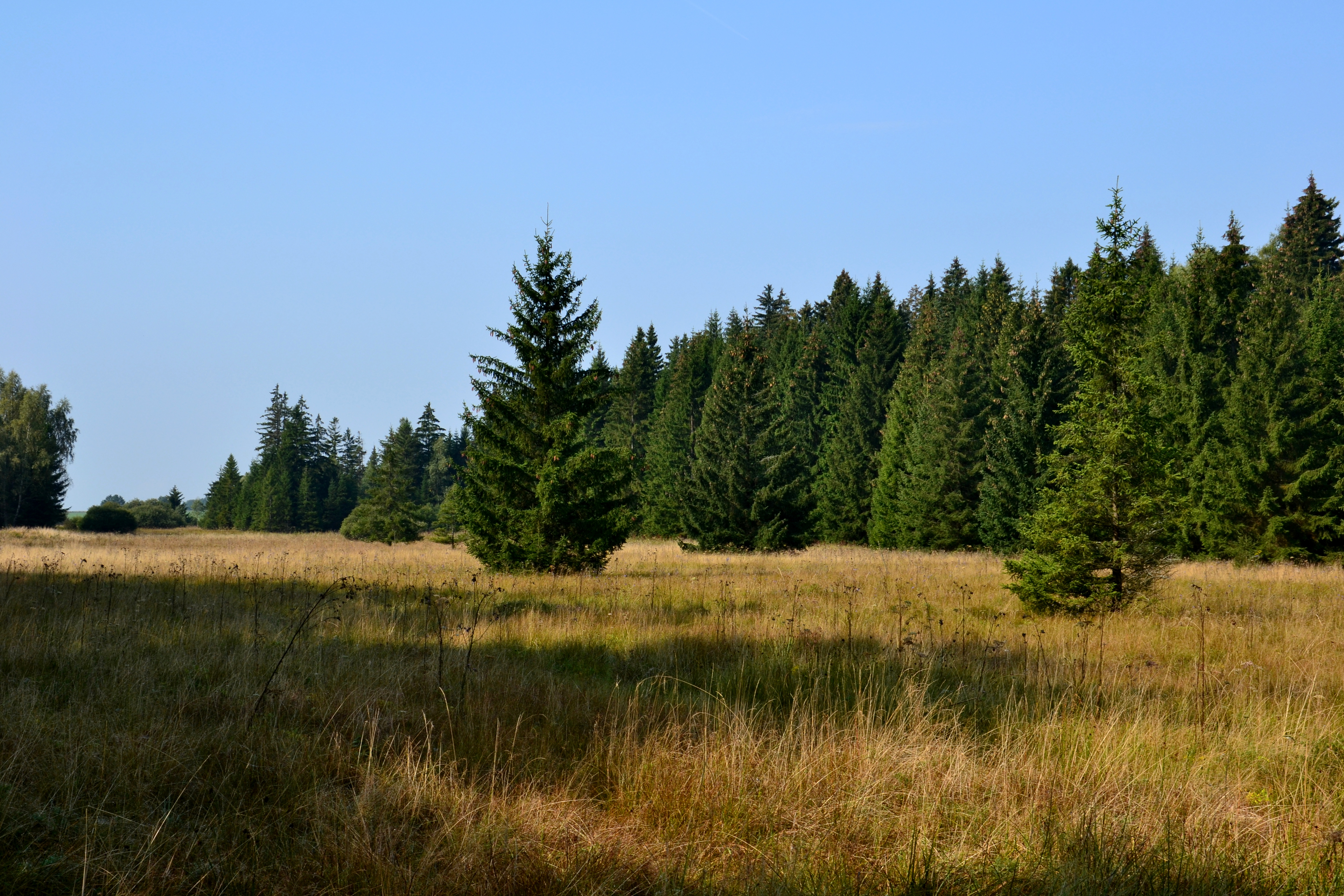 Celkový pohled od východu